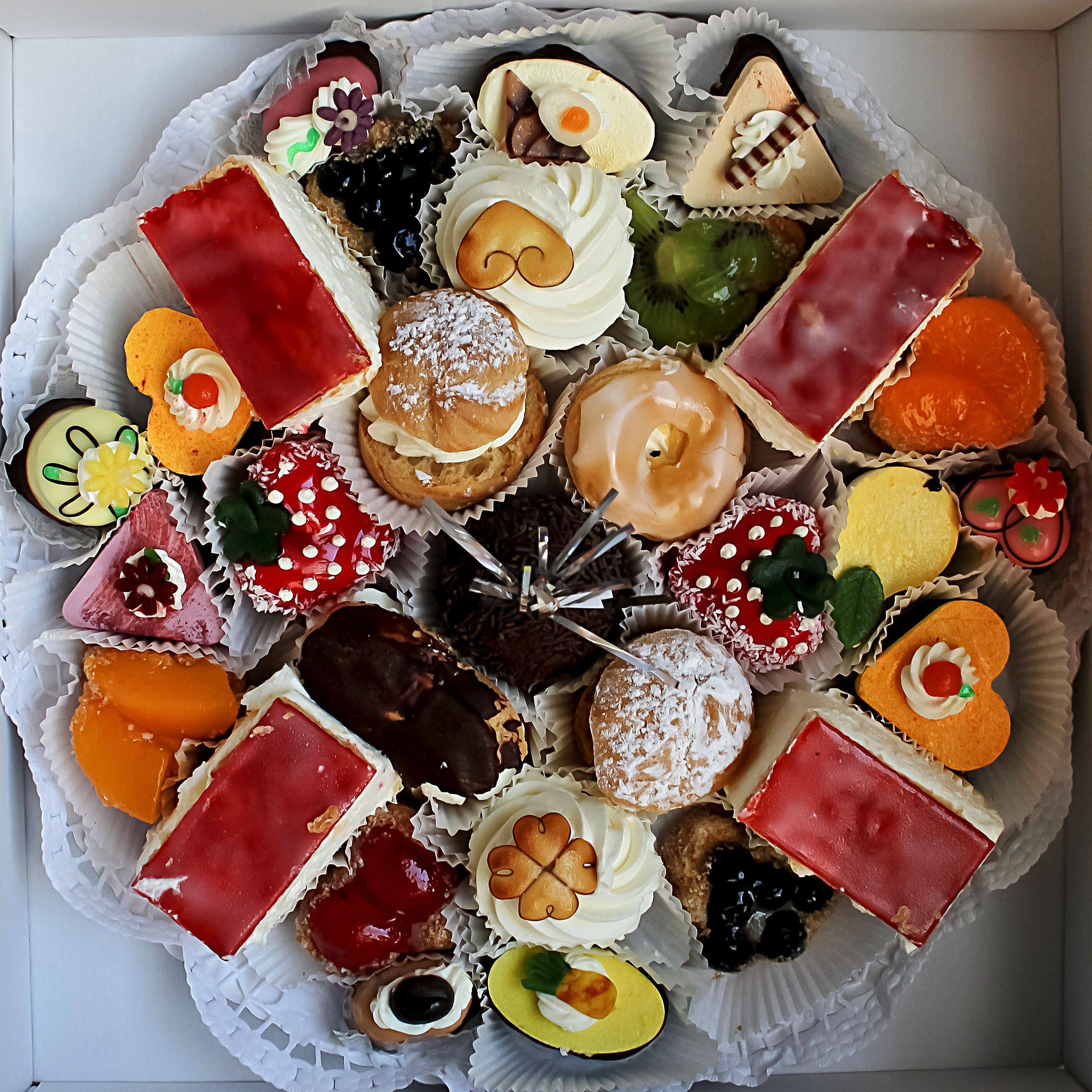 Deutschland, Sachsen, vom Konditor: Bunter Teller (27 Stücke) im Tortenkarton